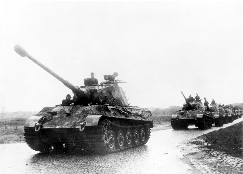 ... und nun der "Königstiger". Ein Wunderwerk deutscher Technik entstand in dem neuen Panzertyp "Königstiger". Aus seinem mächtigen schwergepanzerten Stahlleib ragt drohend das riesige Rohr eines tausendfach bewährten Flakgeschützes. In endloser Kette rollen die "Königstiger" zum Einsatz. Foto: Hamann